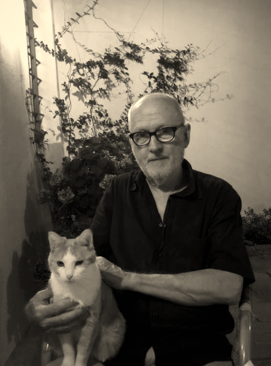 Lóránd Hegyi